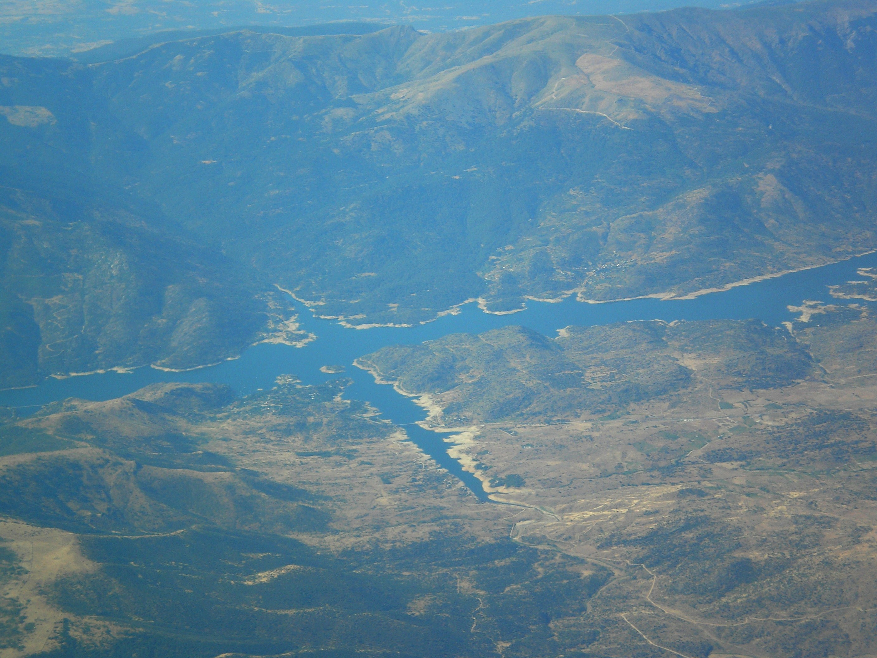 Embalse de Burguillo, provincia de Ávila, Castilla y León, España.